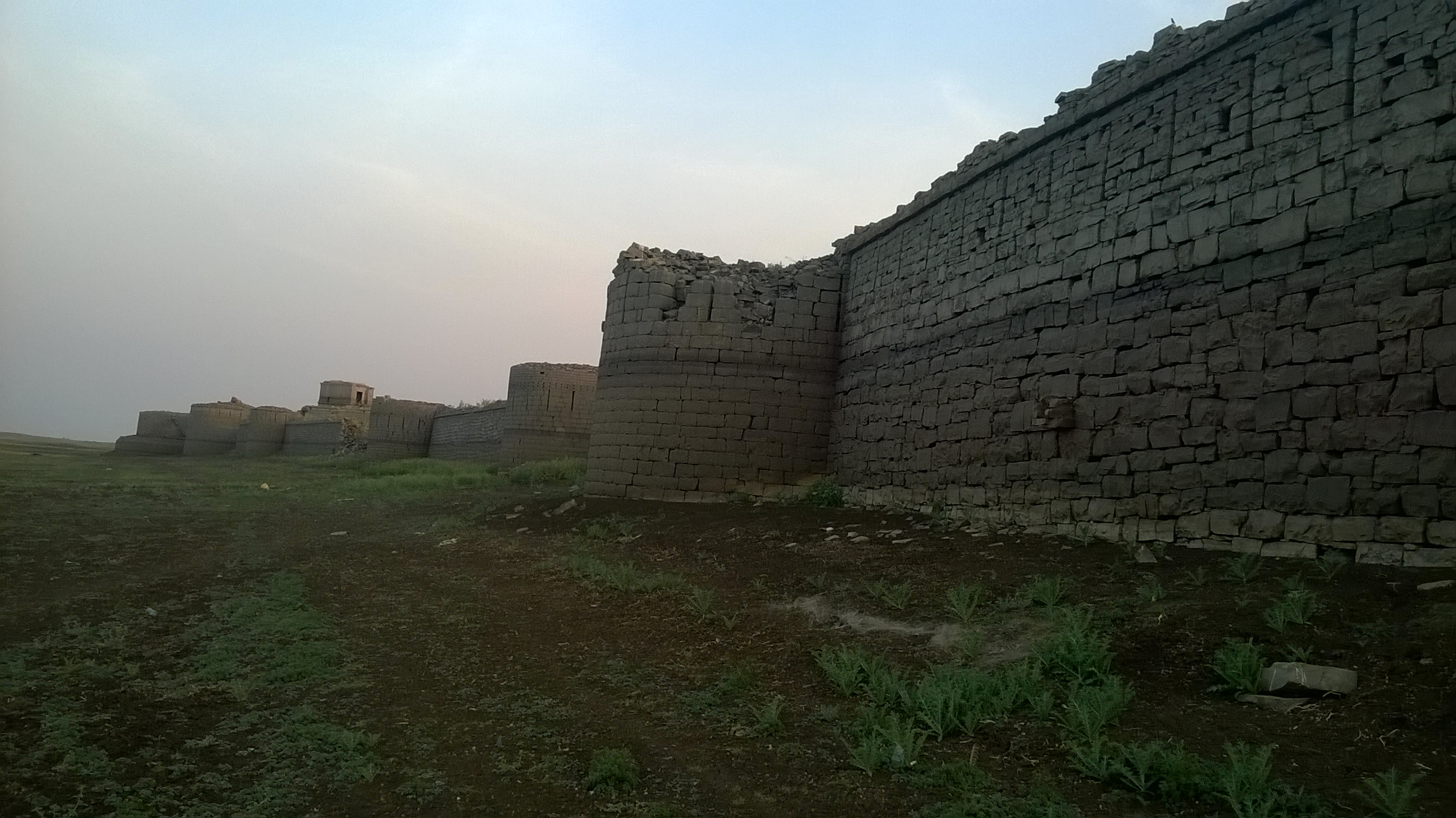 ప్రాగటూరు కోట